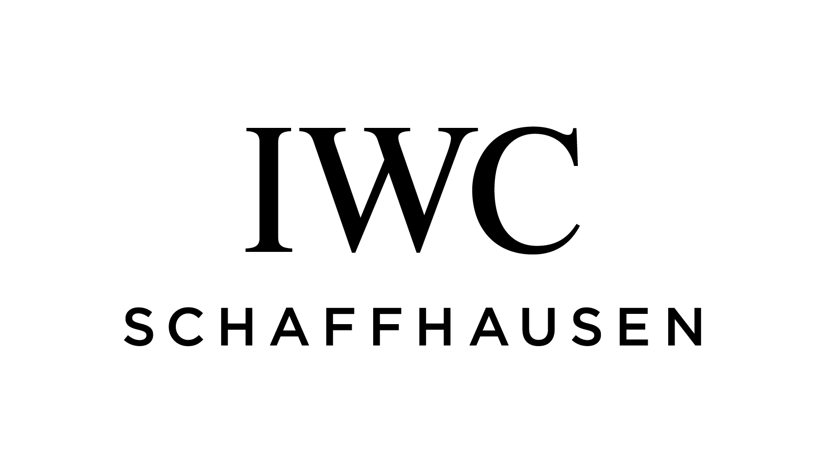 IWC Schaffhausen logo